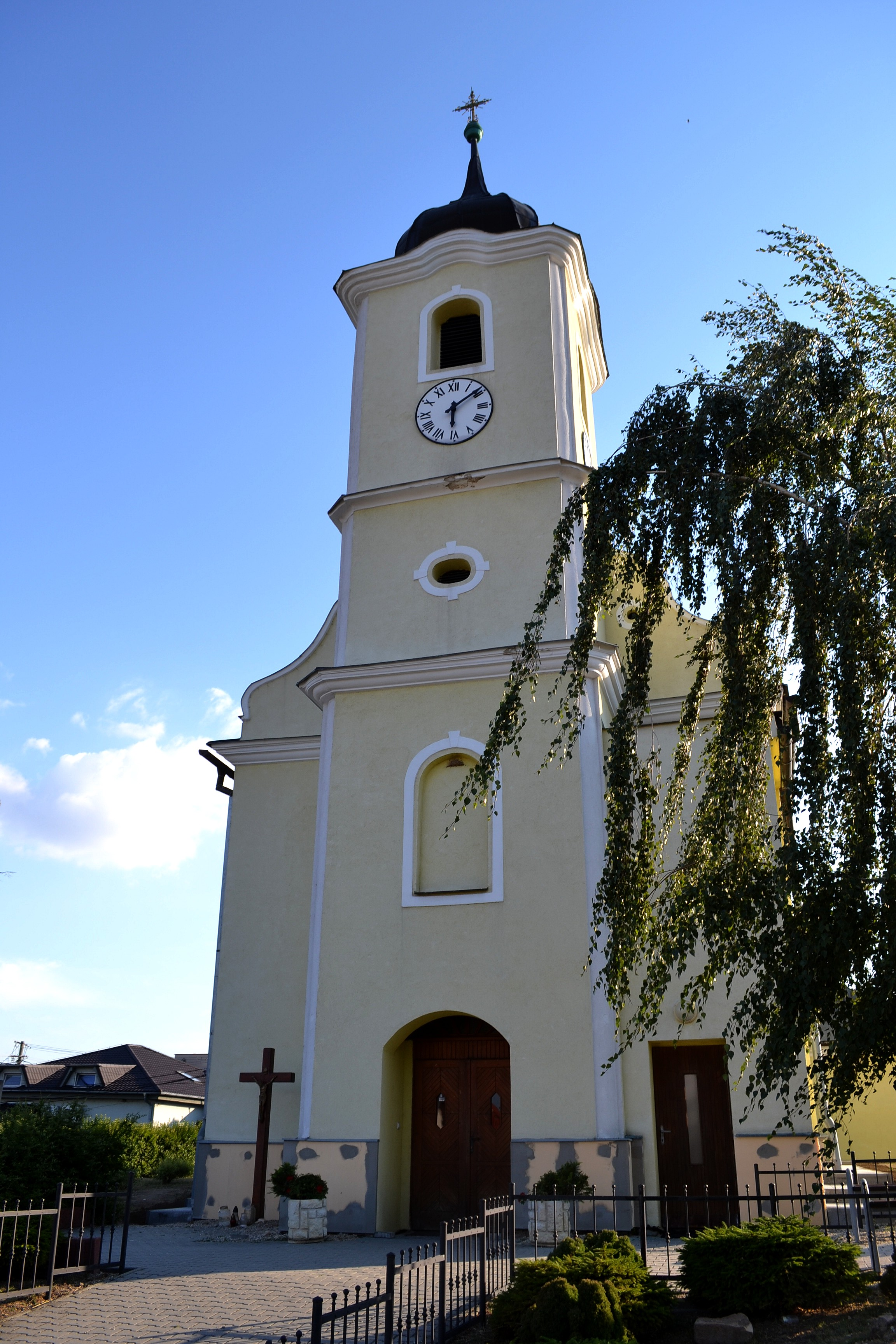 Nitrianske Hrnčiarovce (okr. Nitra), Kostol svätého Juraja; veža kostola je netradične orientovaná na východ